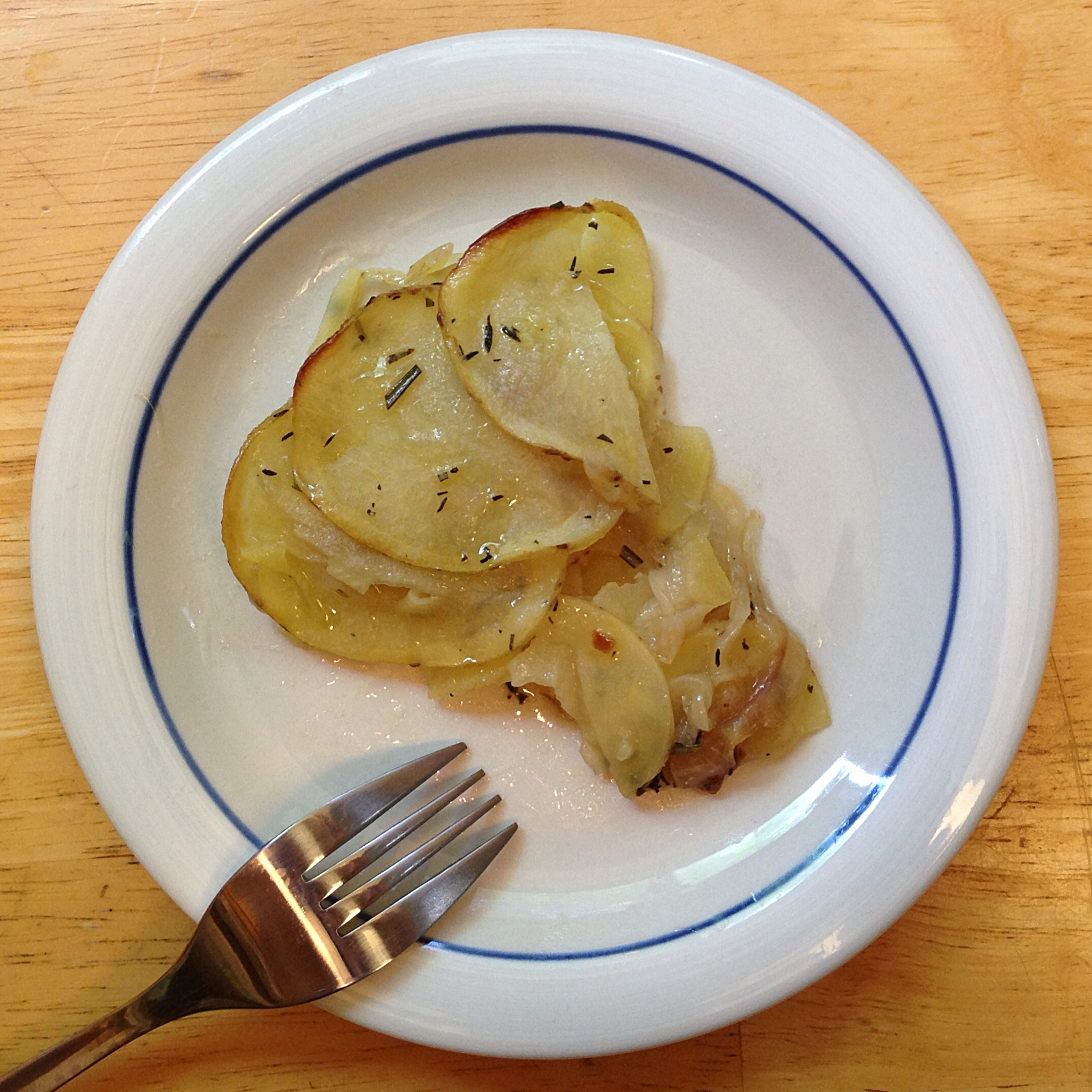 Eine Portion Bäckerkartoffeln, hier mit relativ dünn geschnittenen Kartoffelscheiben.